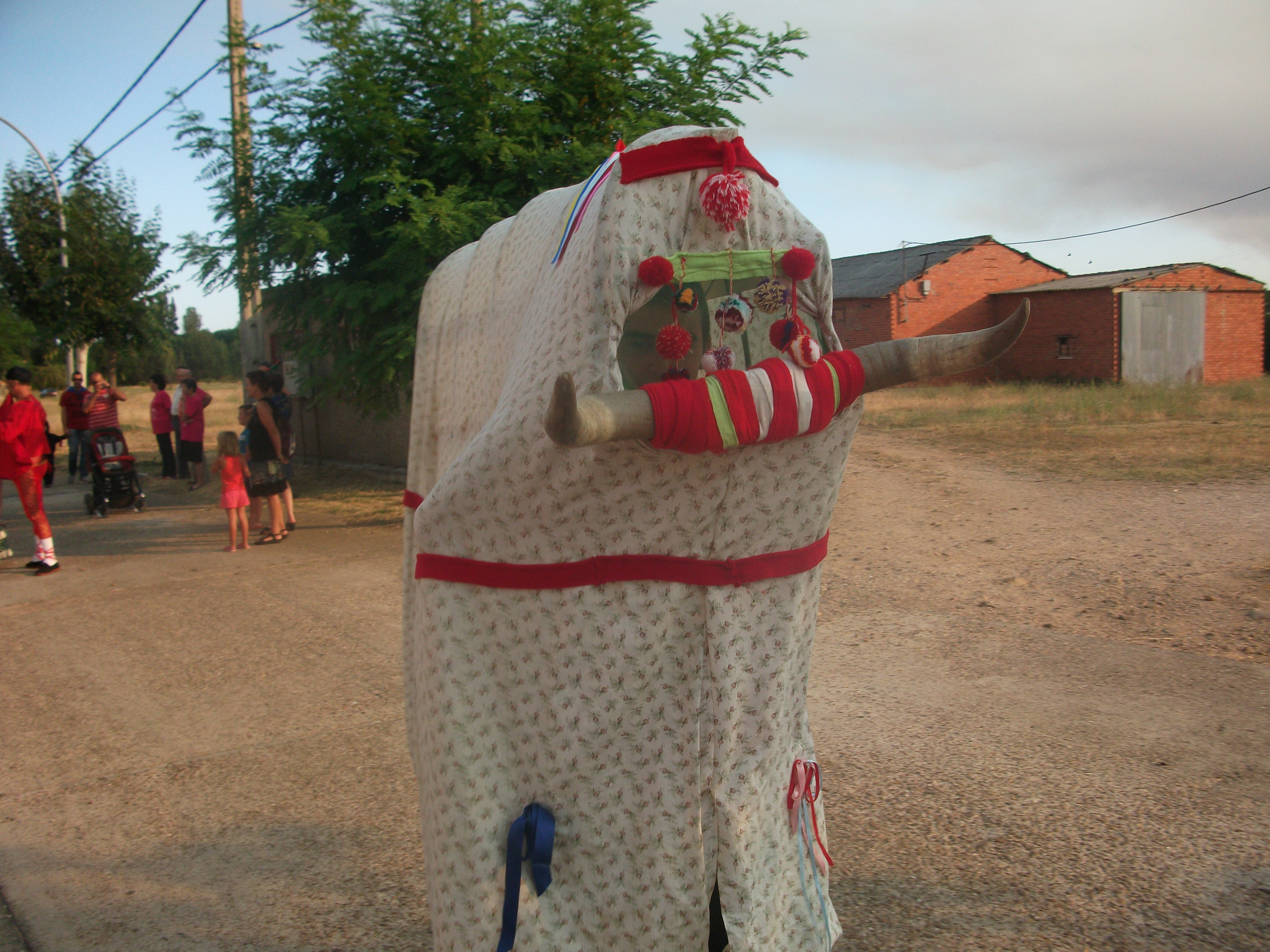 Toro del carnaval de Turcia.